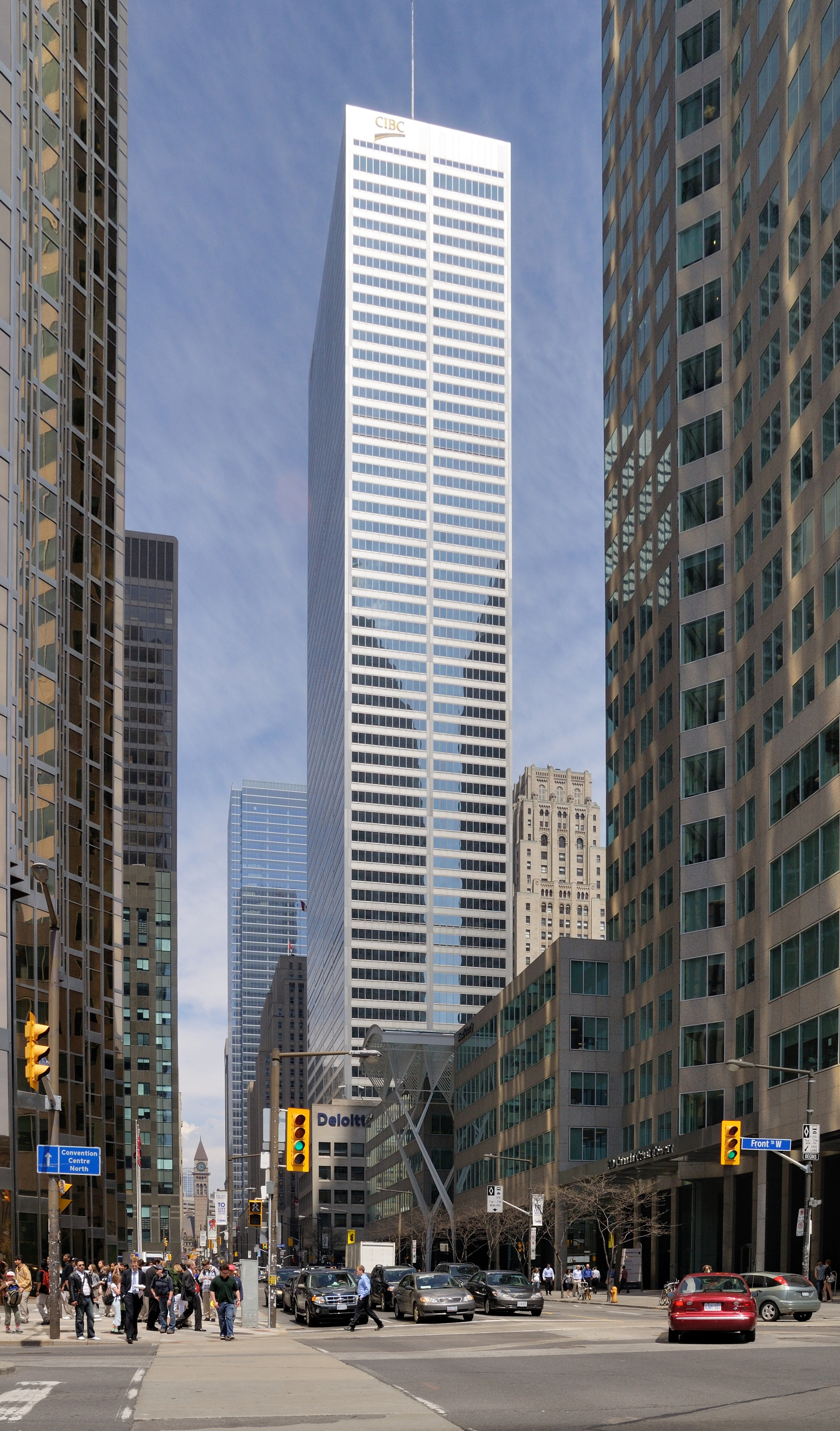 Toronto: Commerce Court West mit Blick in die Bay Street, im Hintergrund das Alte Rathaus